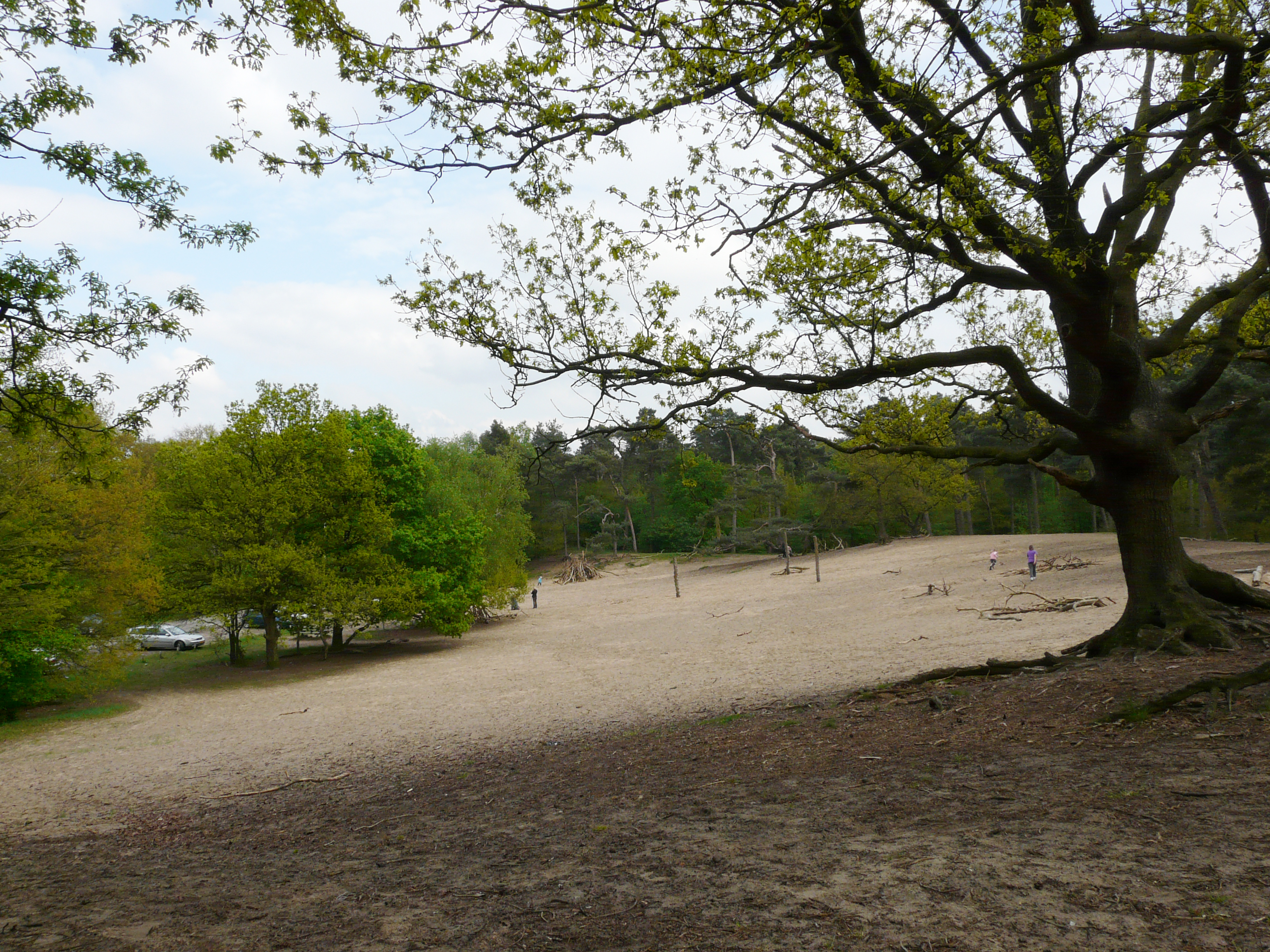 Zicht op een deel van de Seterse bergen in de boswachterij Dorst. Nabij Dorst